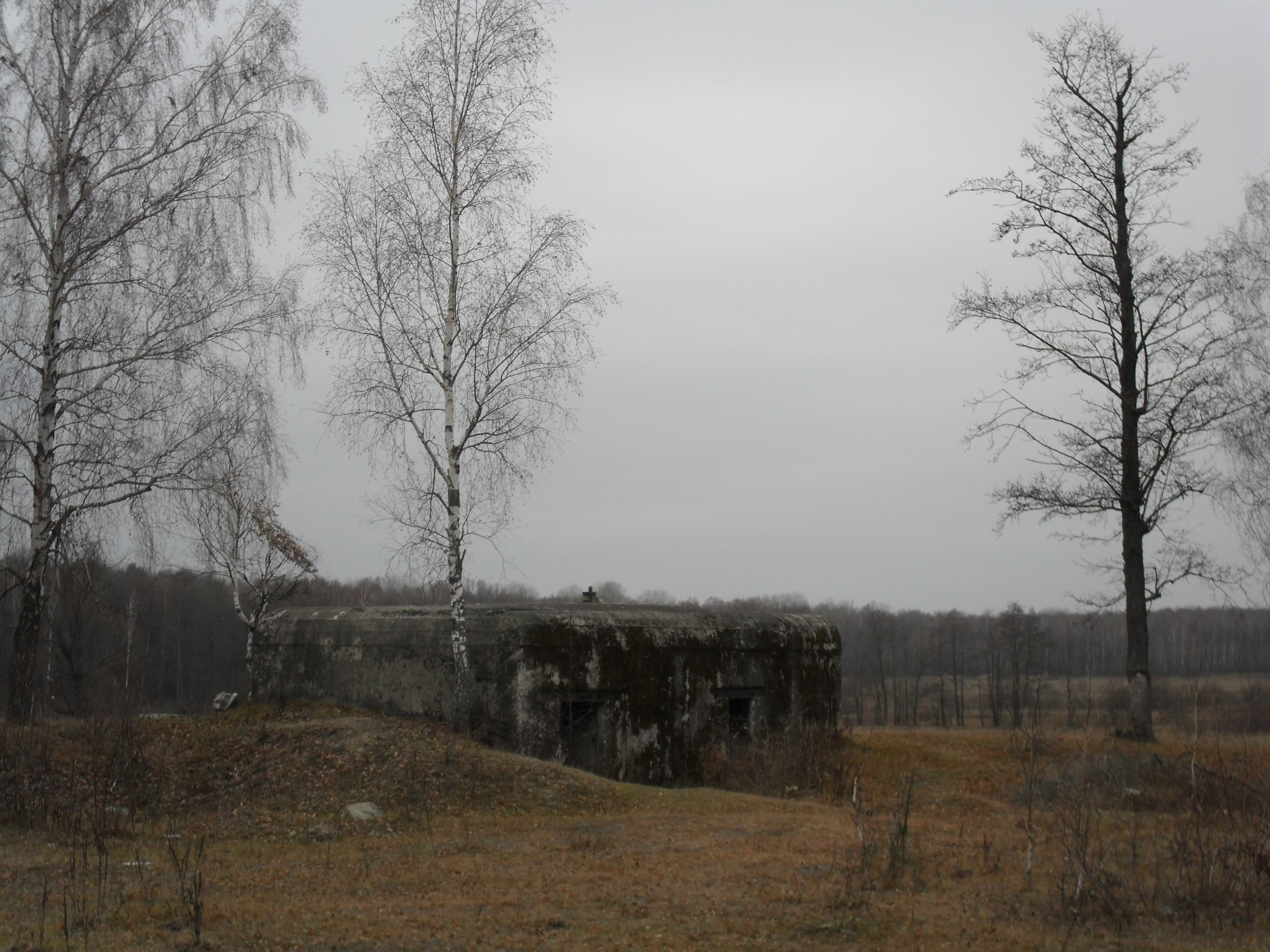 Дот поблизу с. Сантарка